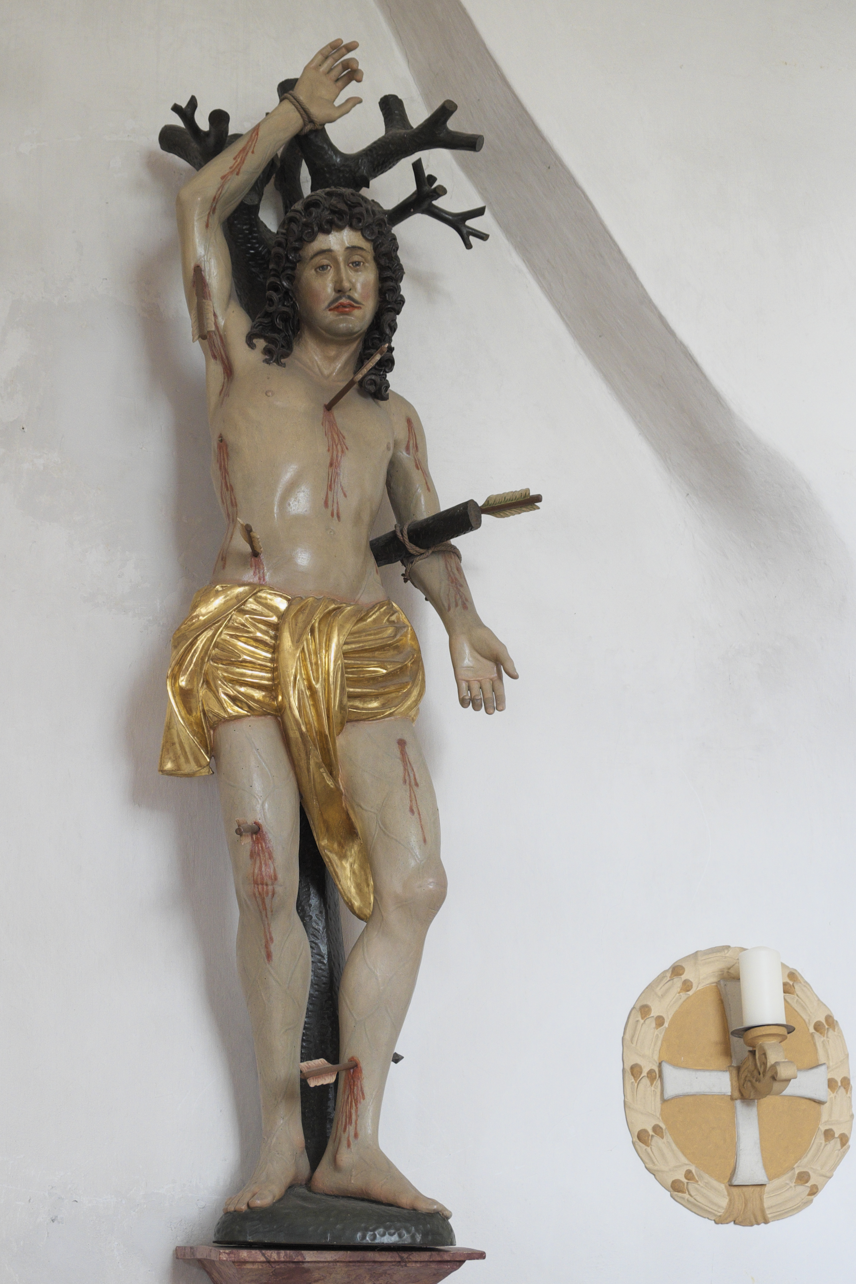 Katholische Filialkirche Unsere Liebe Frau in Machtenstein (Schwabhausen) im Landkreis Dachau (Bayern/Deutschland), heiliger Sebastian (Anfang 17. Jahrhundert)